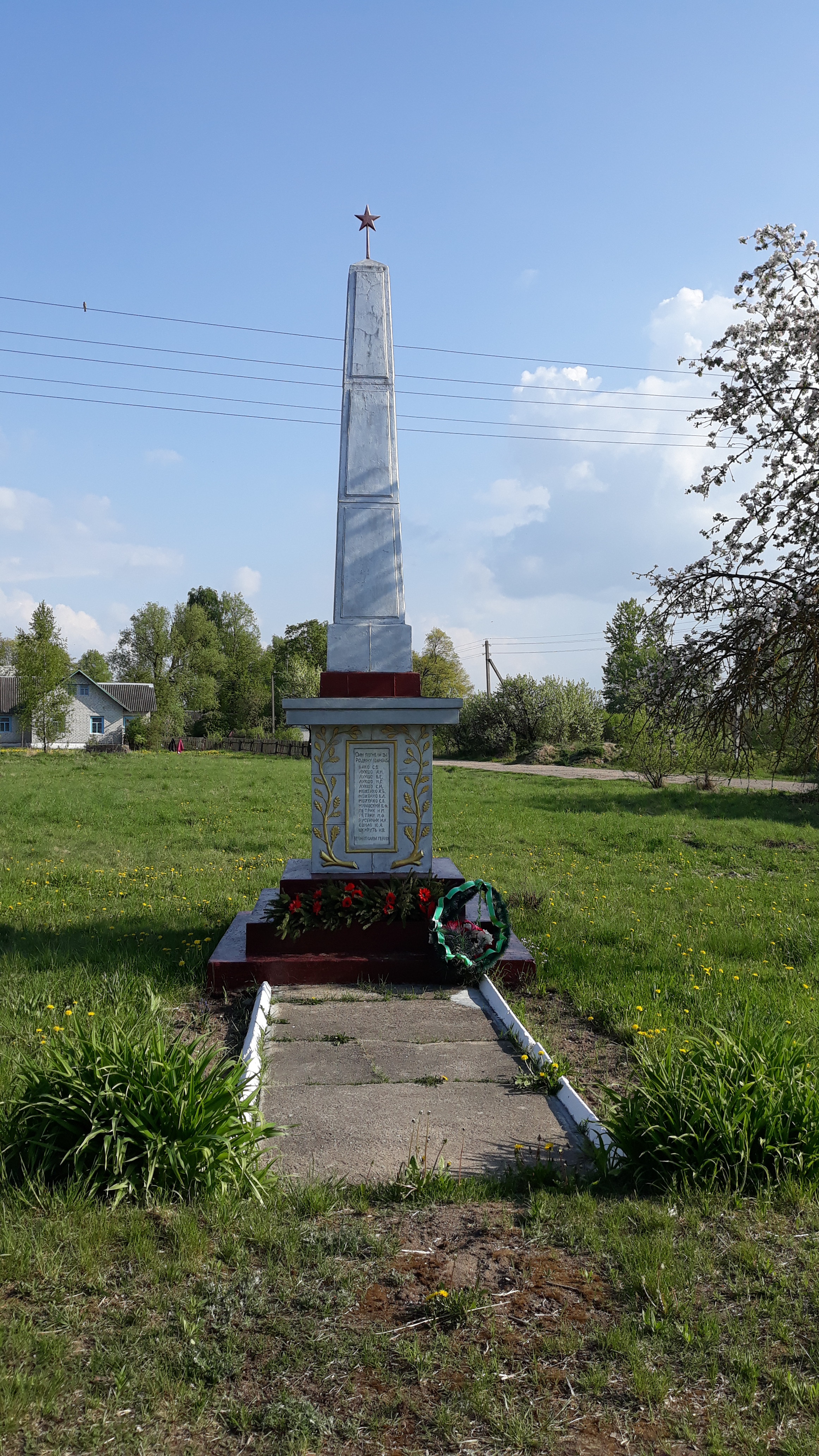 Ваенны помнік у цэнтры вёскі